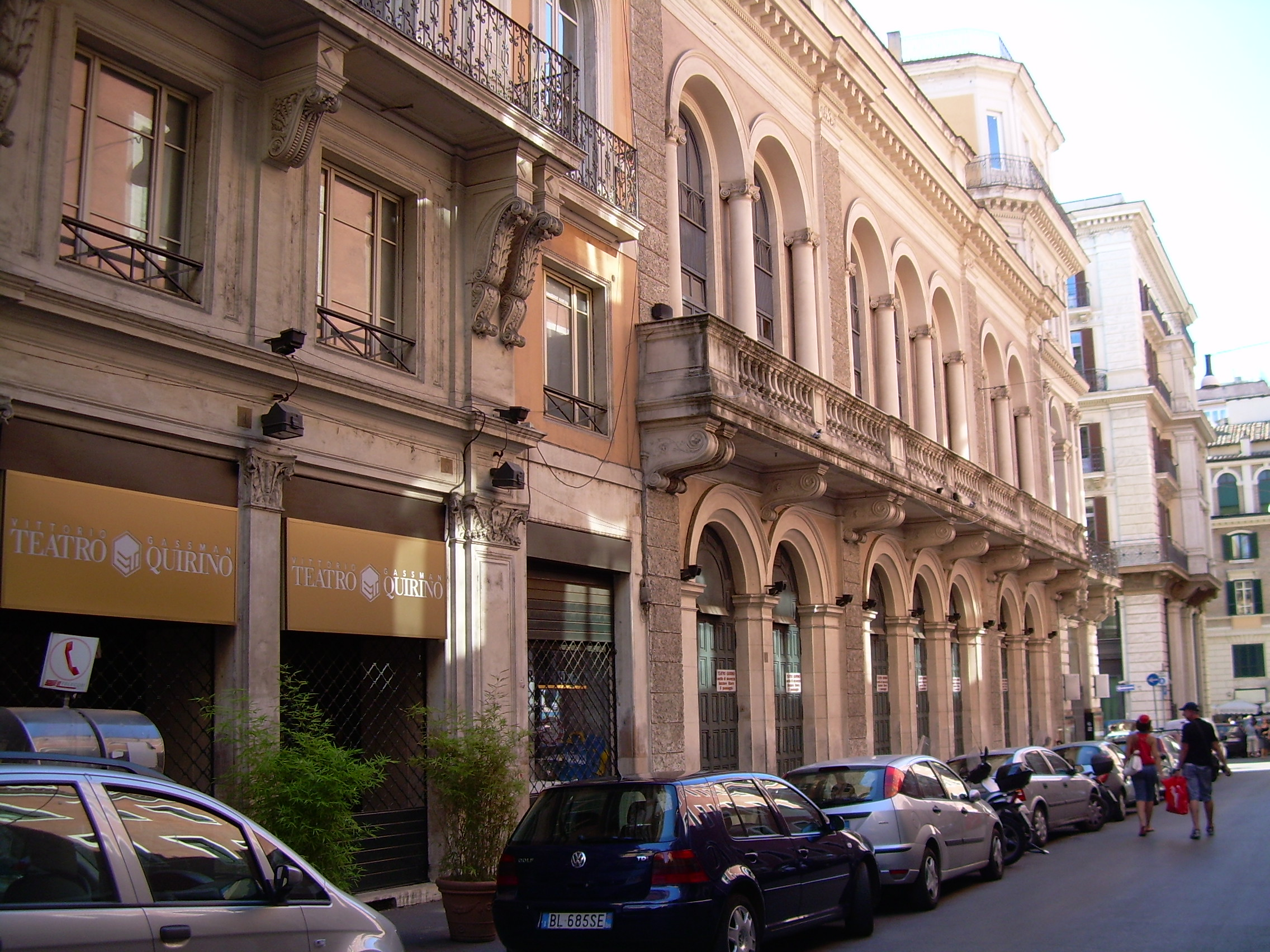 Facciata del teatro Quirino